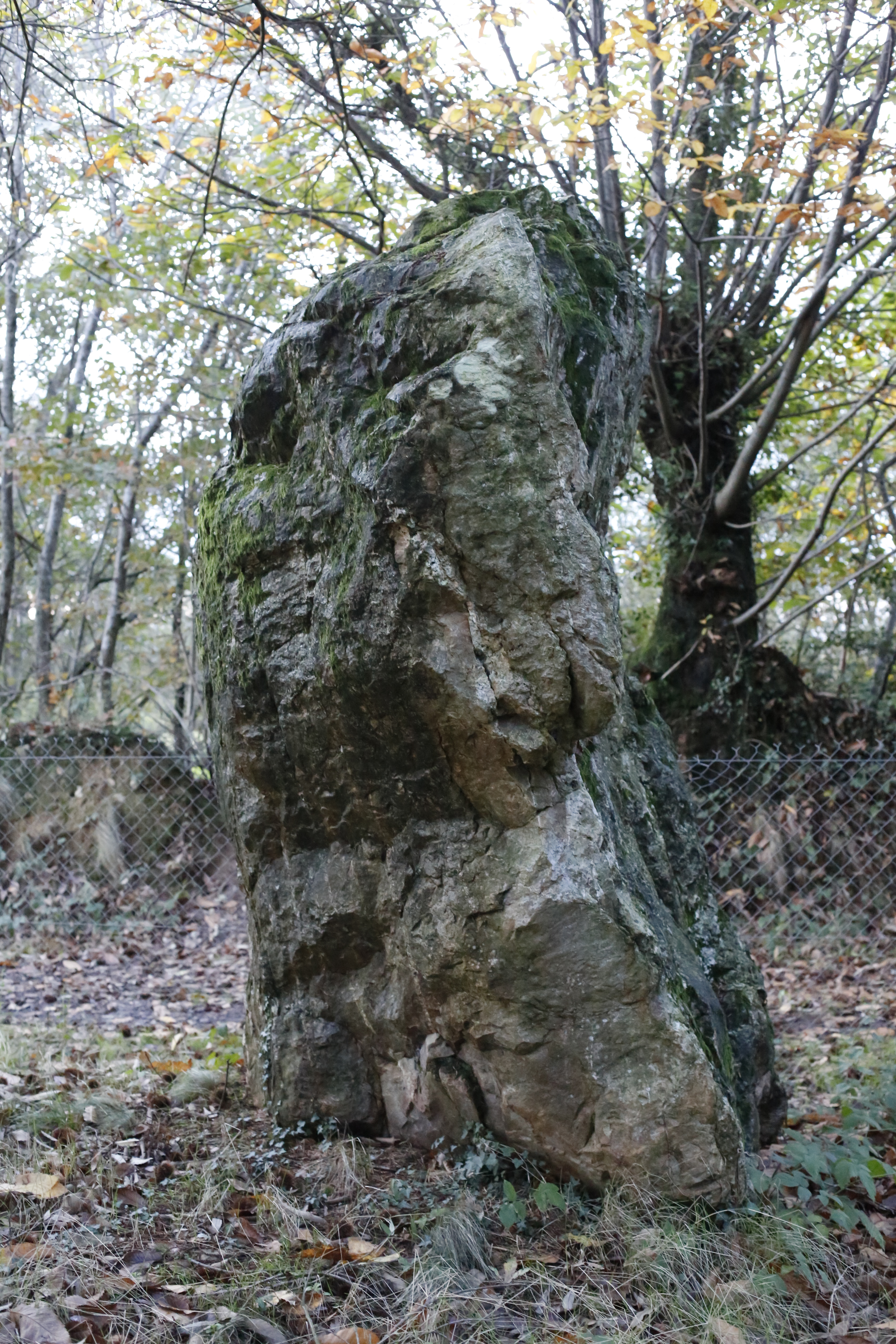 La pierre de Richebourg à Retiers.